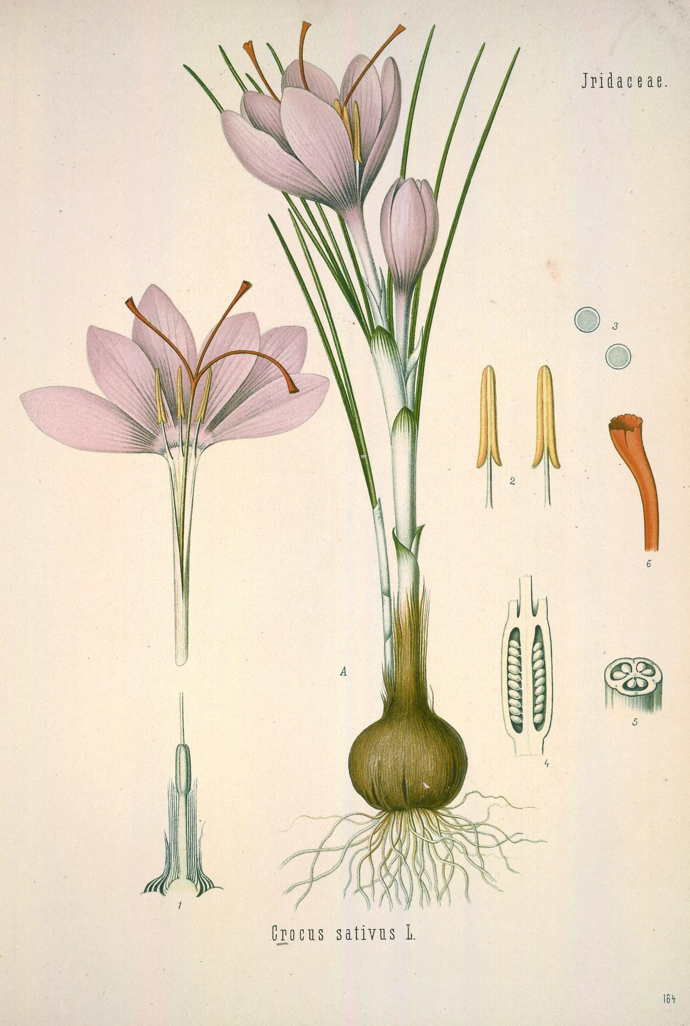 Safran. A Pflanze in natürl. Grösse; 1 dieselbe im Längsschnitt, desgl.; 2 Staubgefässe, vergrössert; 3 Pollen, desgl.; 4 Fruchtknoten im Längsschnitt, desgl.; 5 derselbe im Querschnitt; 6 Narbe, desgl.